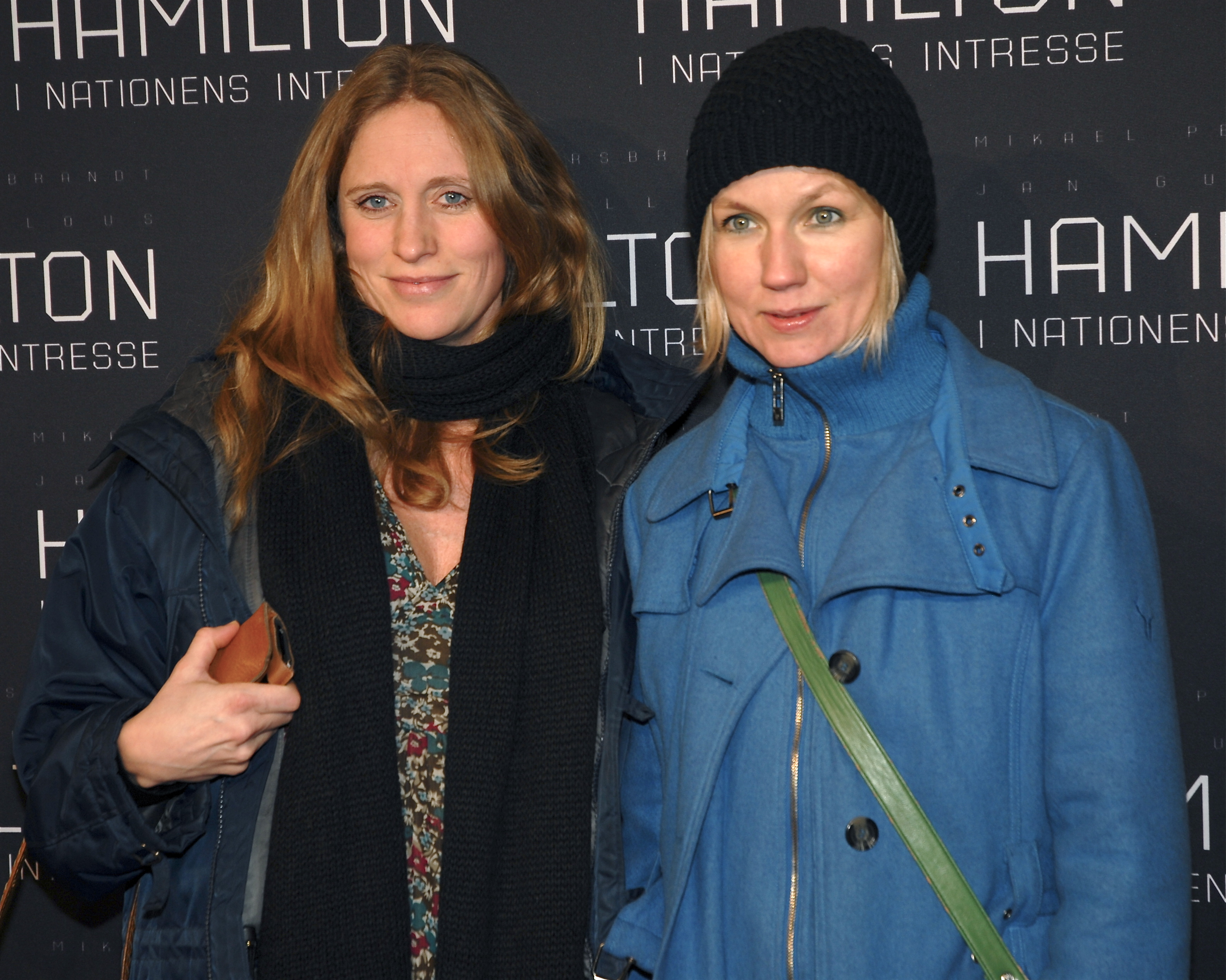 Lisa Rosengren och Tova Magnusson på galapremiären av Hamilton - I nationens intresse, på biograf Sergel i Stockholm den 9 januari 2012.